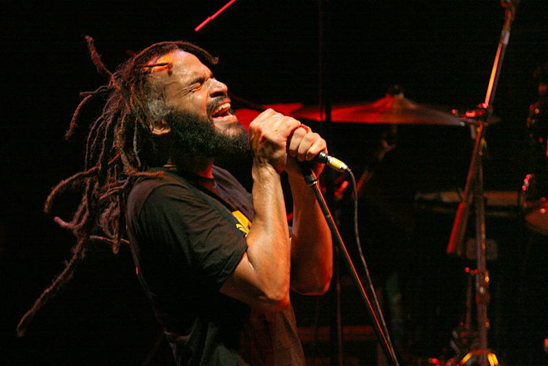 Circo Voador